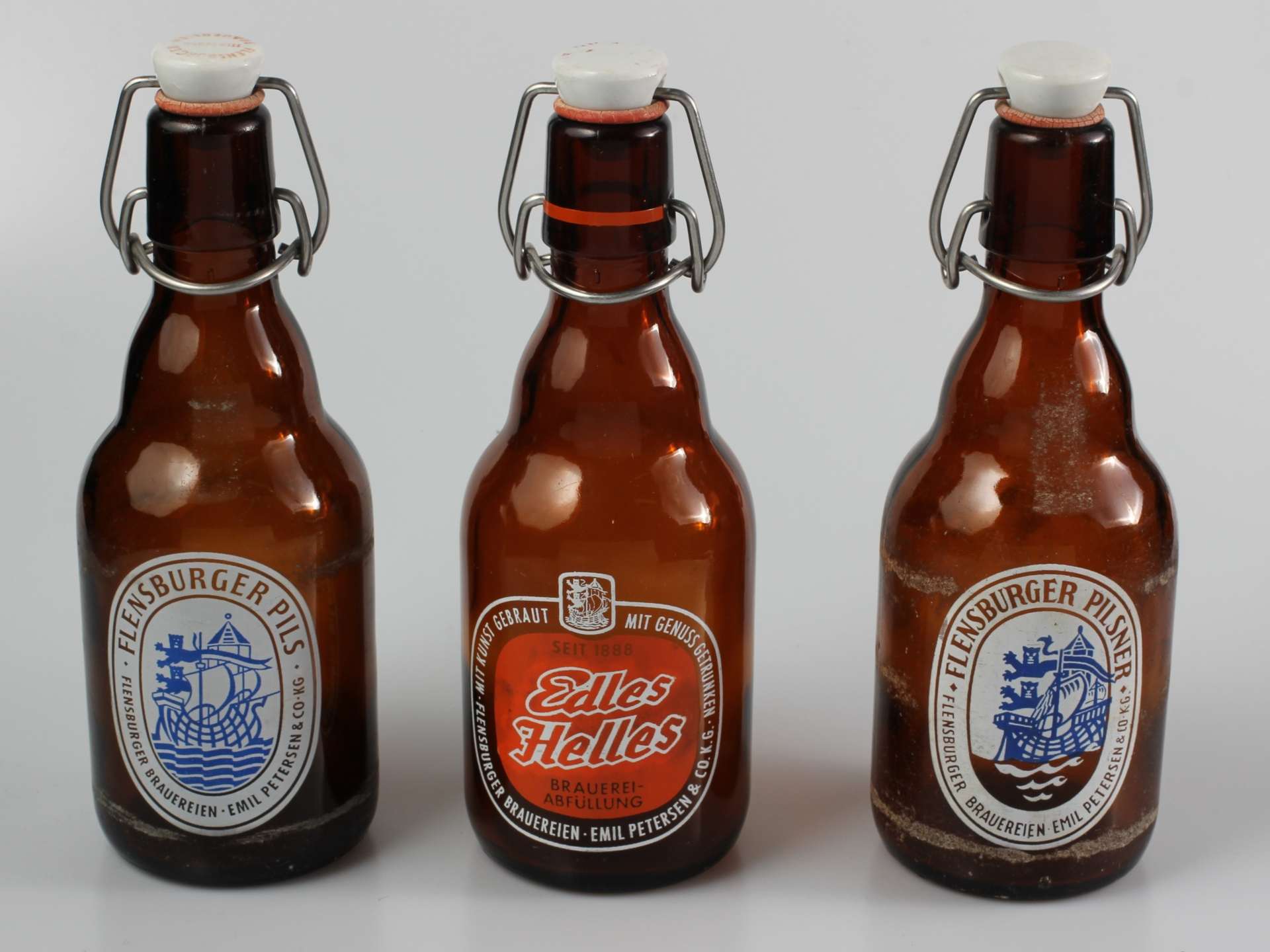 Flensburger Pilsner